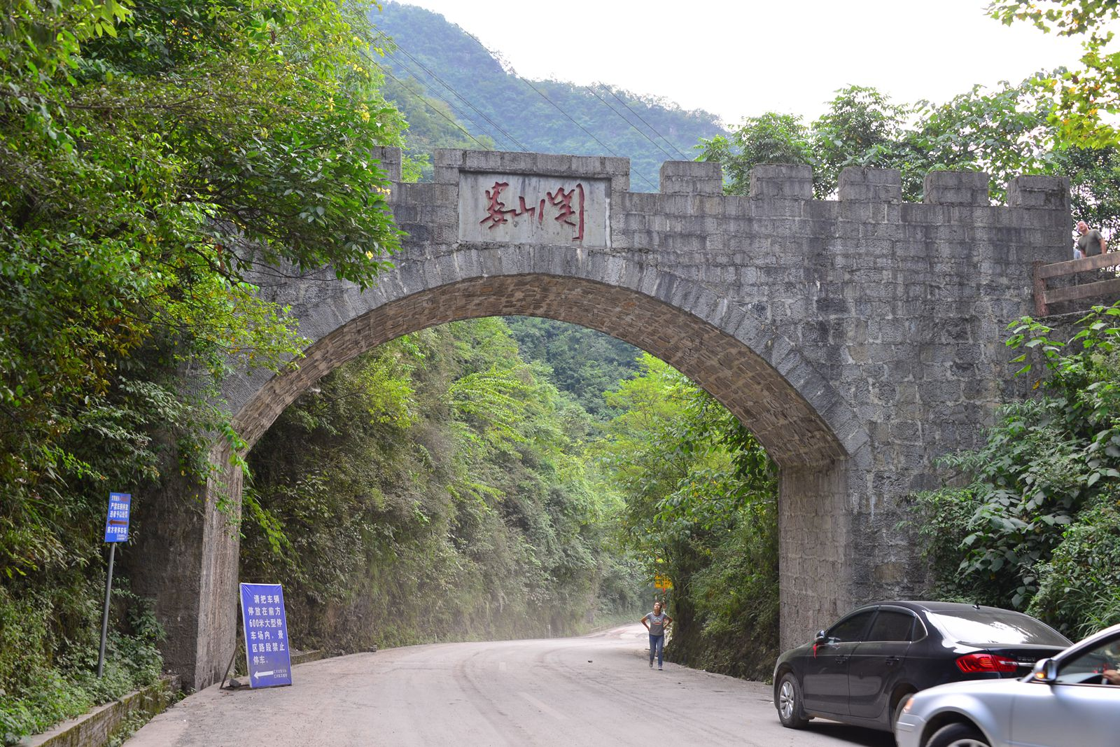 巡道工出品 Photo by Xundaogong 210国道骑行 松坎-遵义